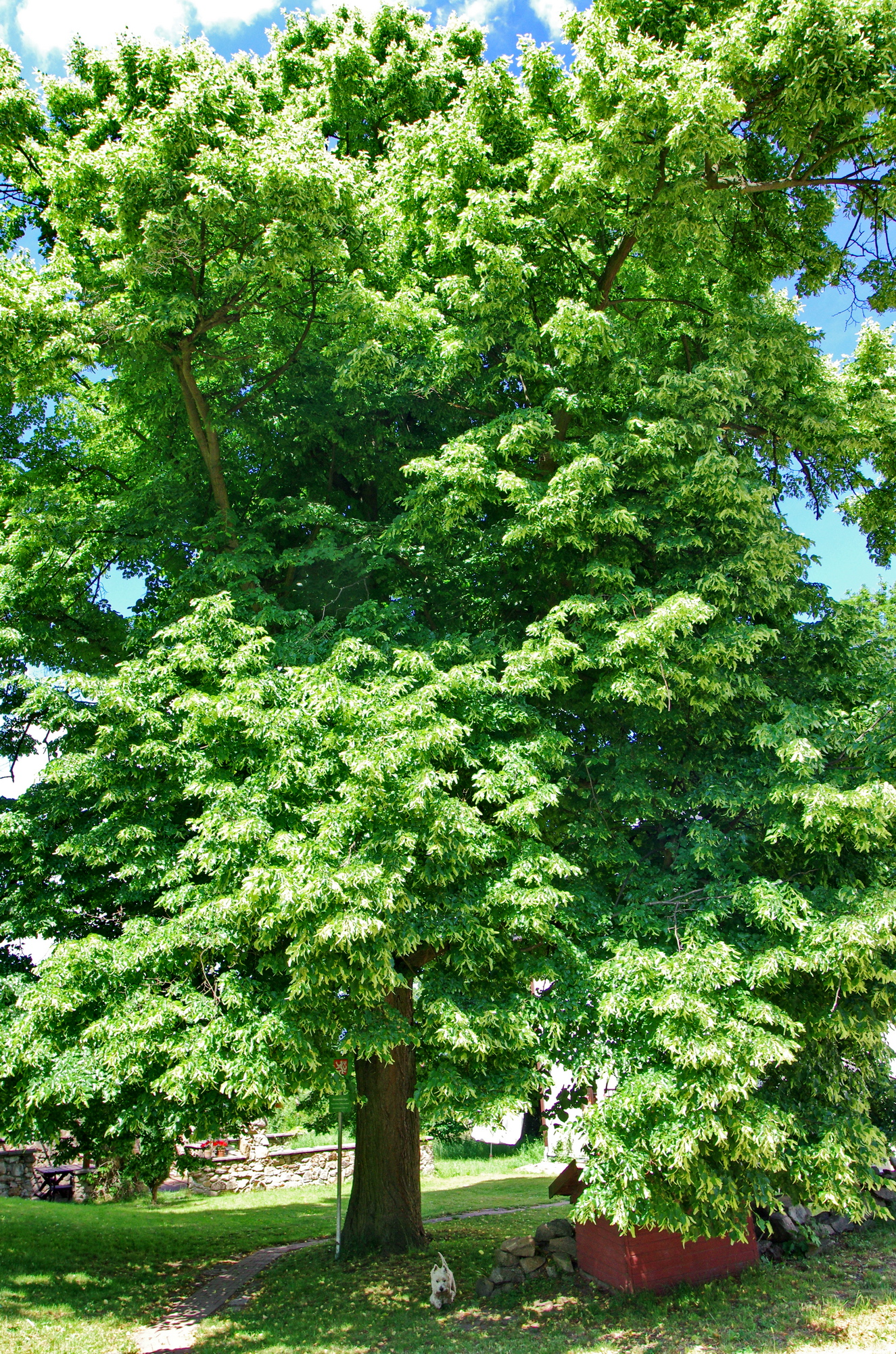 Památný strom Mezirolská lípa, Mezirolí, okres Karlovy Vary